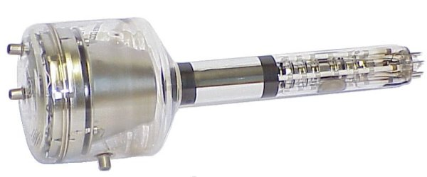 Potenzialspeicherröhre Typ LN−9 aus dem SBZ-System eines russischen Radargerätes